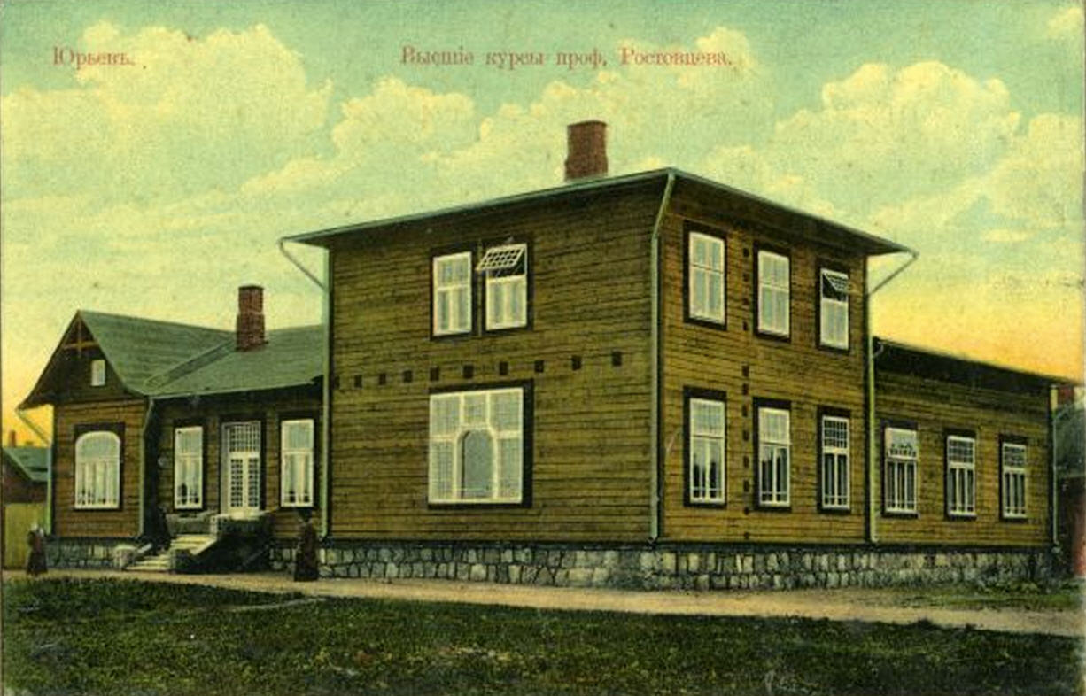 Rostovtsevi eraülikooli hoone Tartus 1908